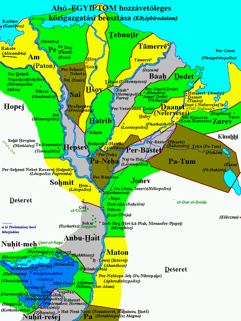 A középbirodalmi Egyiptom térképe (Kr. e. 21–18. sz.)